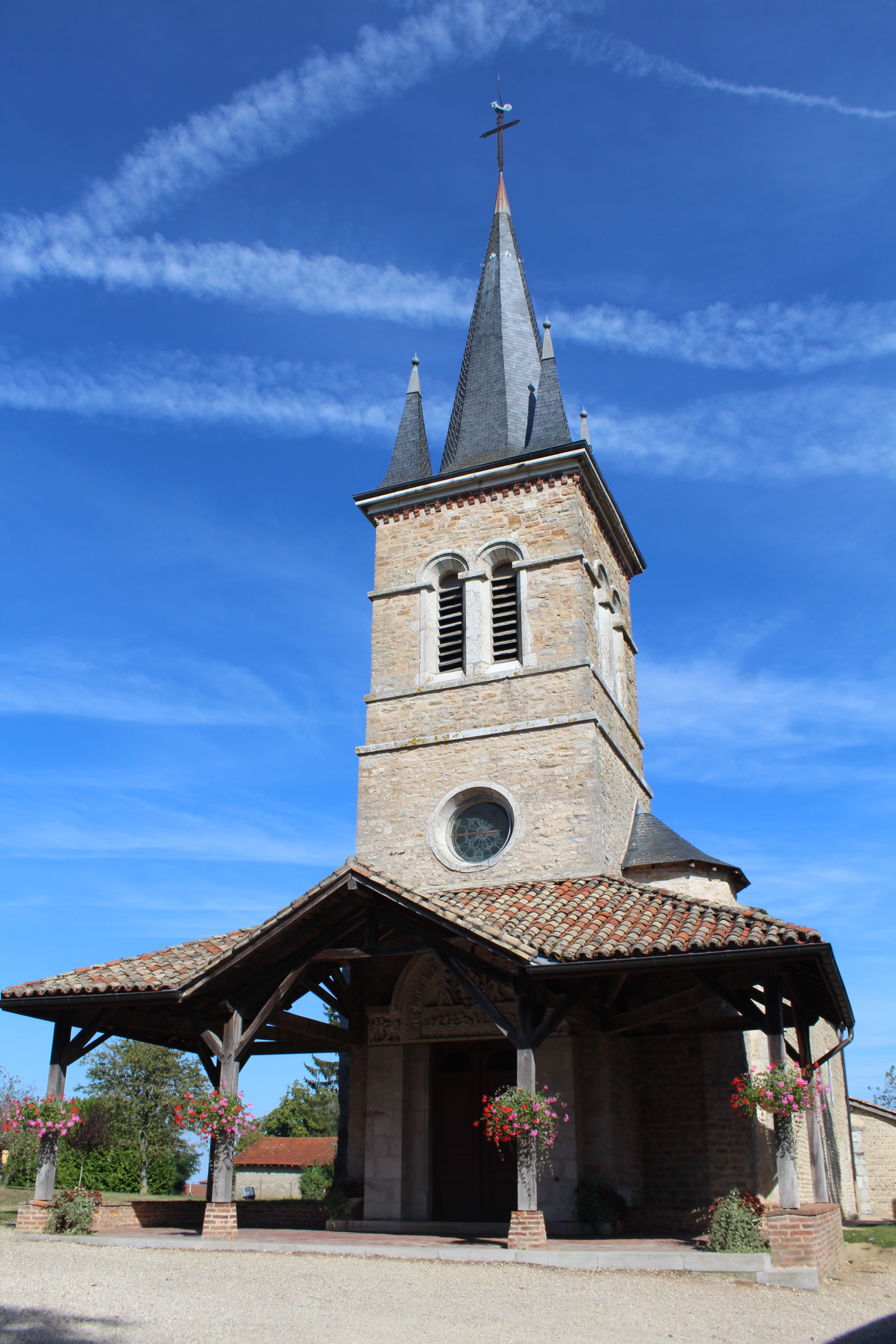 Église Notre-Dame de Vandeins